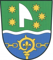 Horní Studénky, znak. Zeleno-modře stříbrným zúženým vlnitým břevnem dělený štít. Nahoře doleva obrácená vztyčená stříbrná radlice provázená po stranách pěti zlatými osmihrotými hvězdami (2, 3), dole vyrůstající zlatá berla se závitem zakončeným lilií přerušující zlatý řetěz vynikající z okrajů.